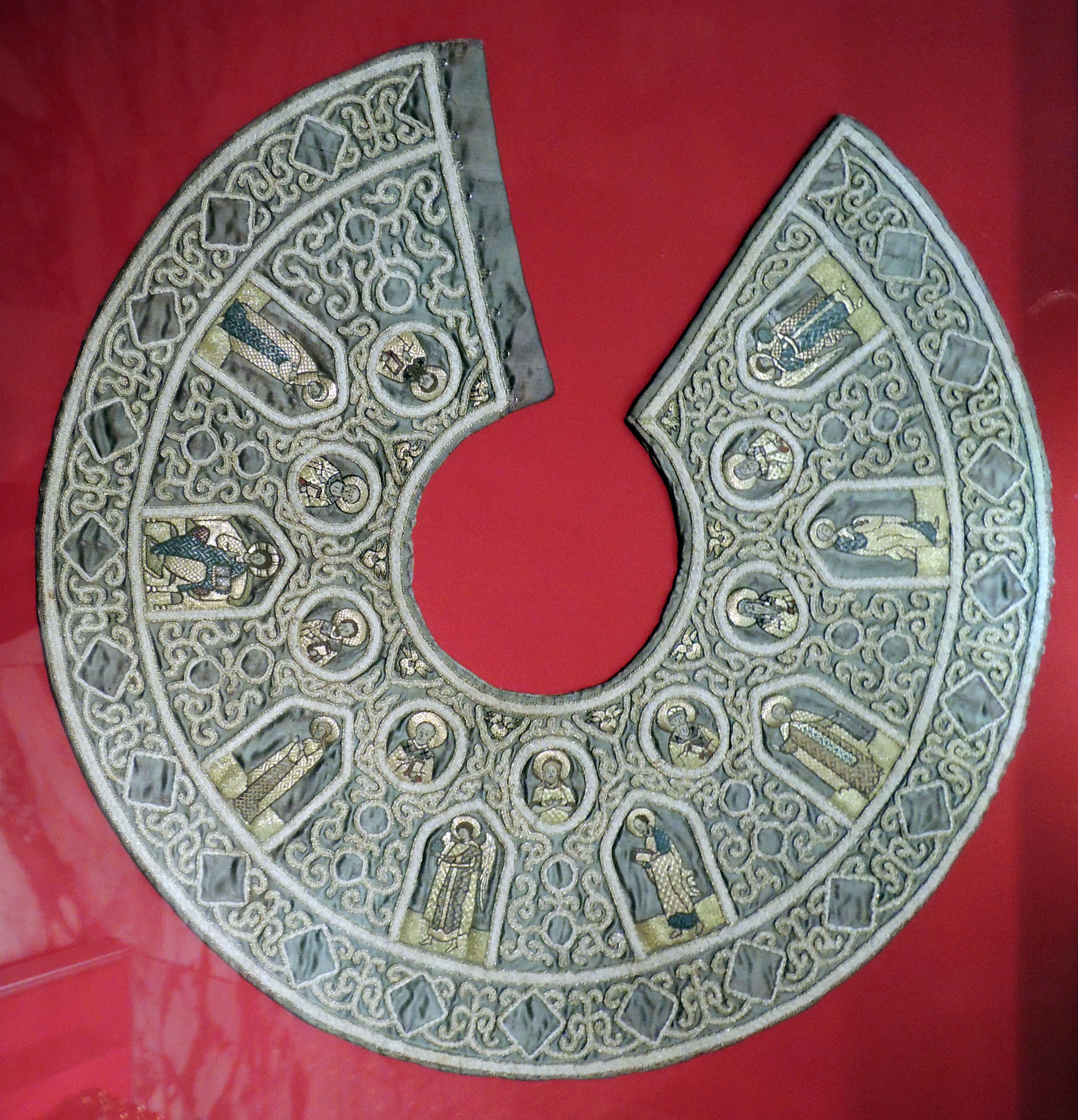 Древние шитые бармы (царя Михаила Фёдоровича) — Атлас — XII в., Италия. Шитье — 1629—1645, Россия.